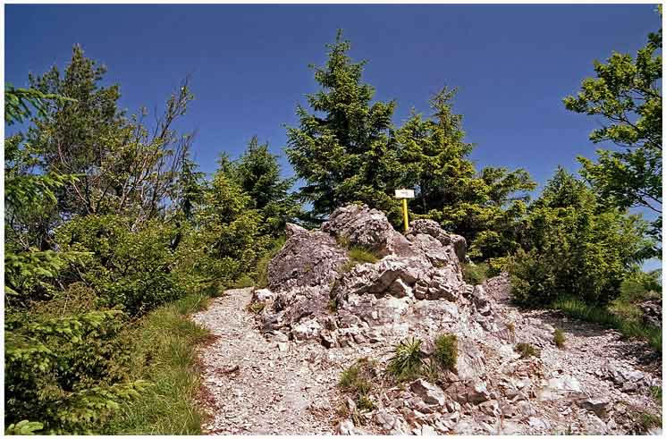 Sokolie 1171 m, Malá Fatra, district Žilina, Slovakia autor: Prazak Date: 2004